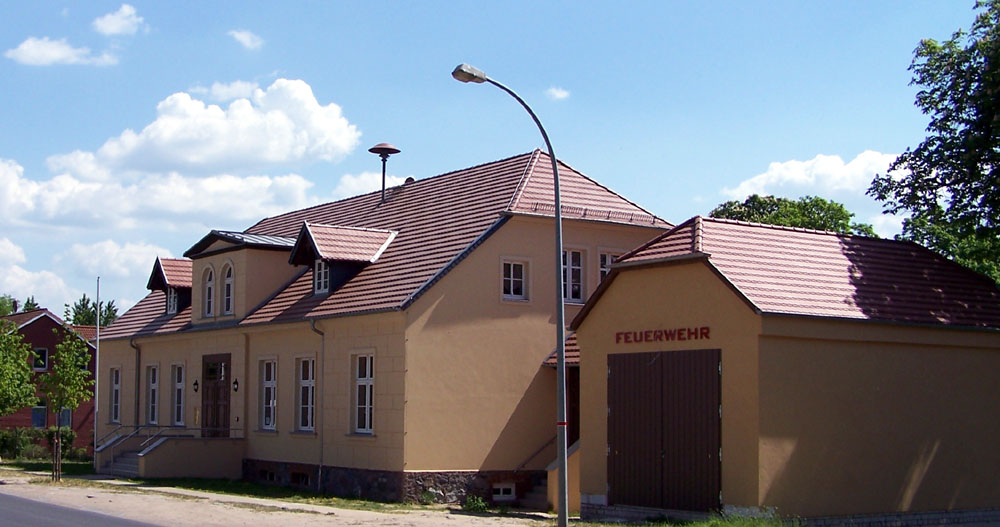 Gemeindehaus Langen, Fehrbellin, Kreis Brandenburg